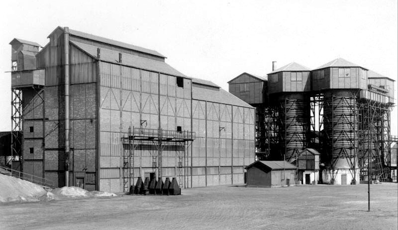 Zwavelfabriek van de "Maastrichtsche Zinkwit Maatschappij" aan de Borgharenweg in Limmel bij Maastricht. Fotocollectie RHCL Maastricht, GAM 7483.